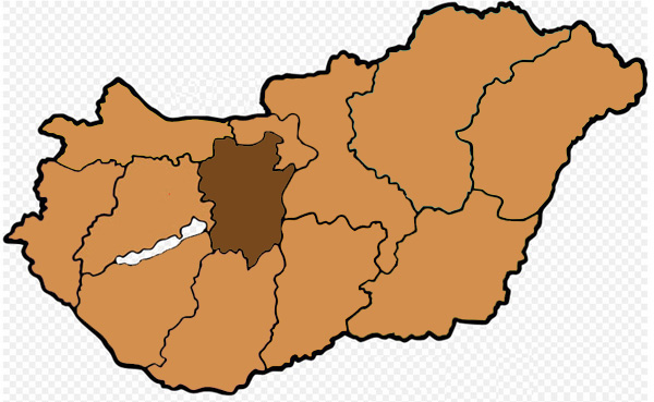 Mappa dell'arcidiocesi cattolica di Szekesfehervar, in Ungheria. Lavoro personale eseguito da questa immagine di Commons.